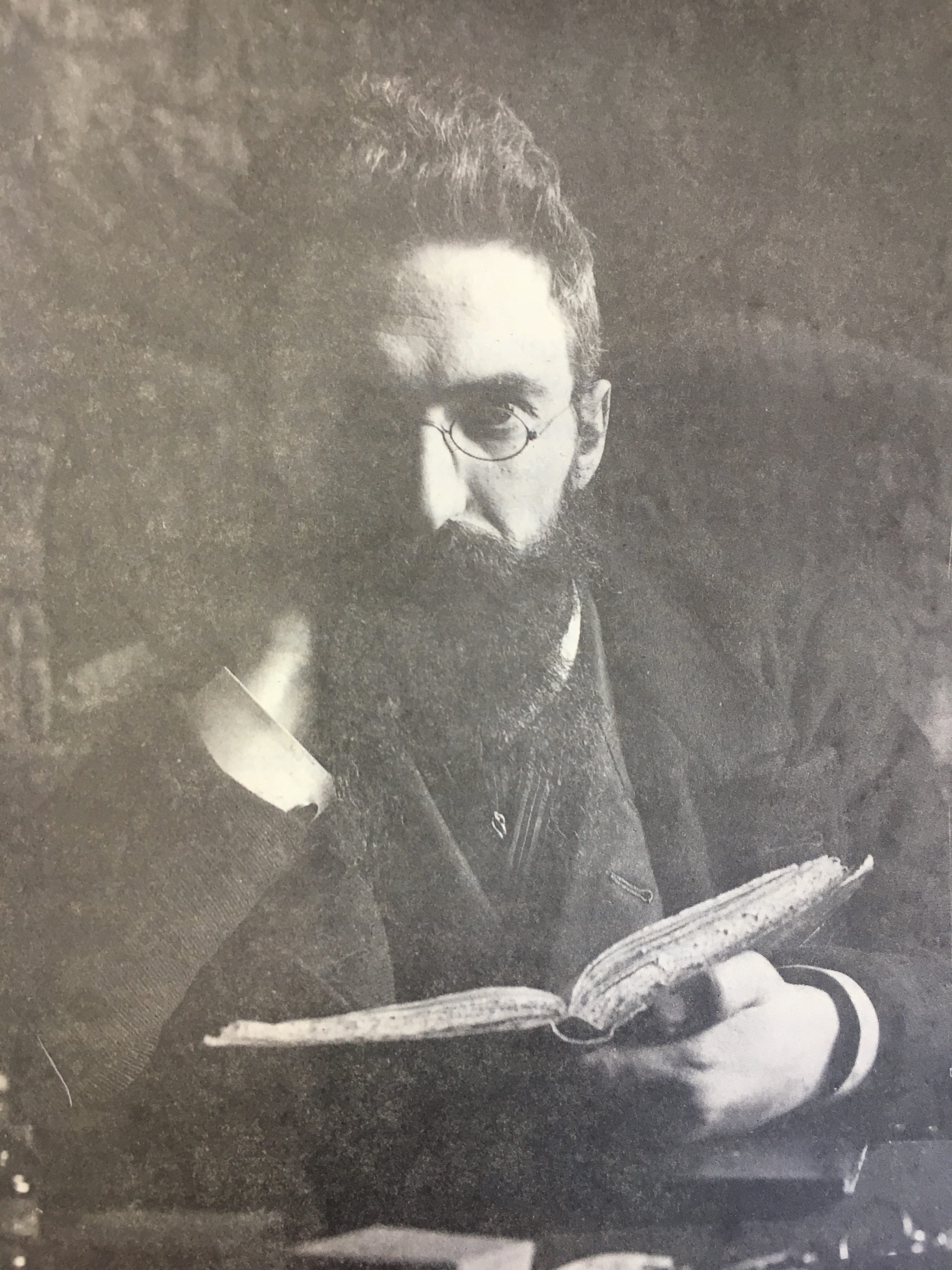 Enrico Rostagno